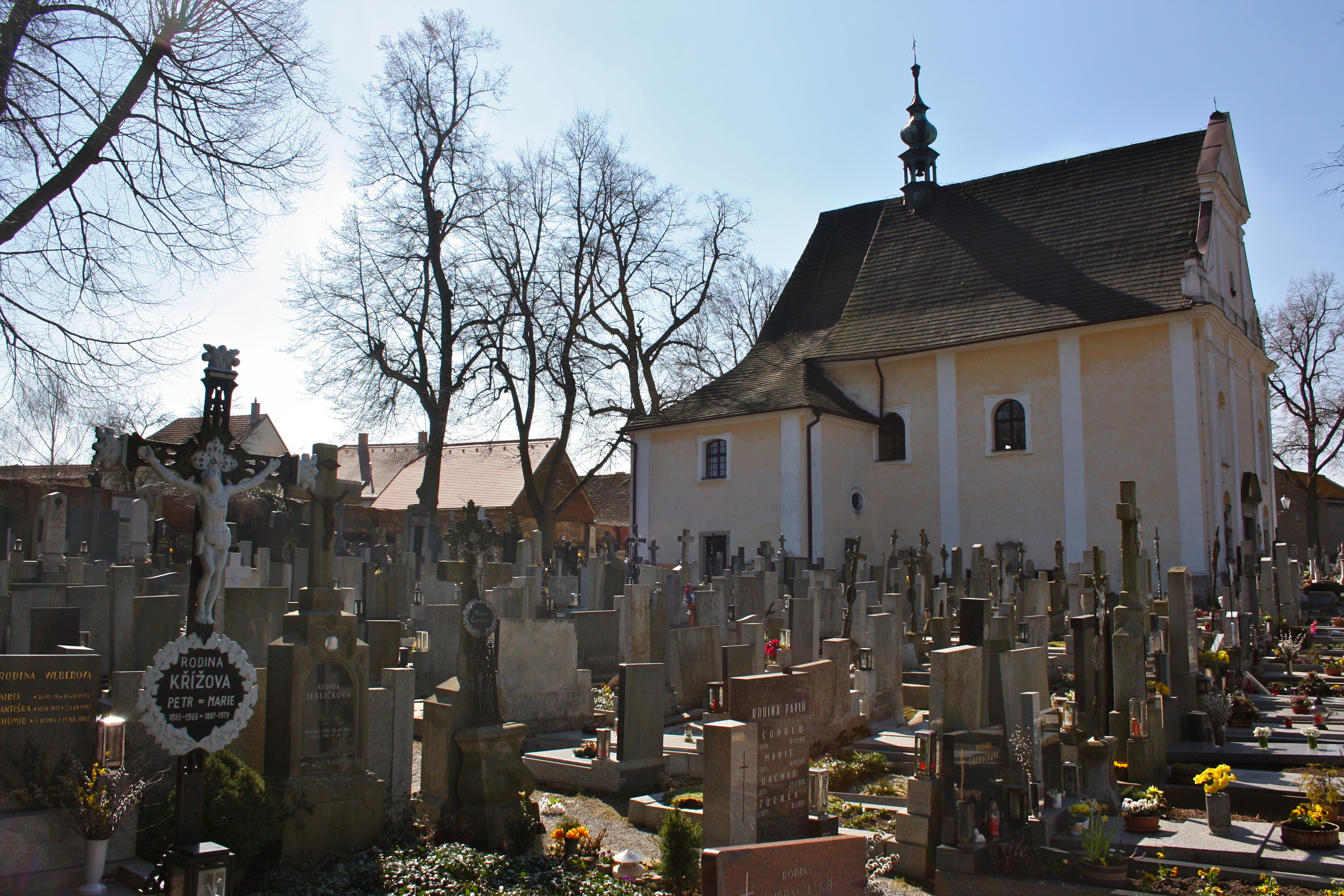 Kostel sv. Anny (Telč), Svatoanenská, Masarykova, Telč